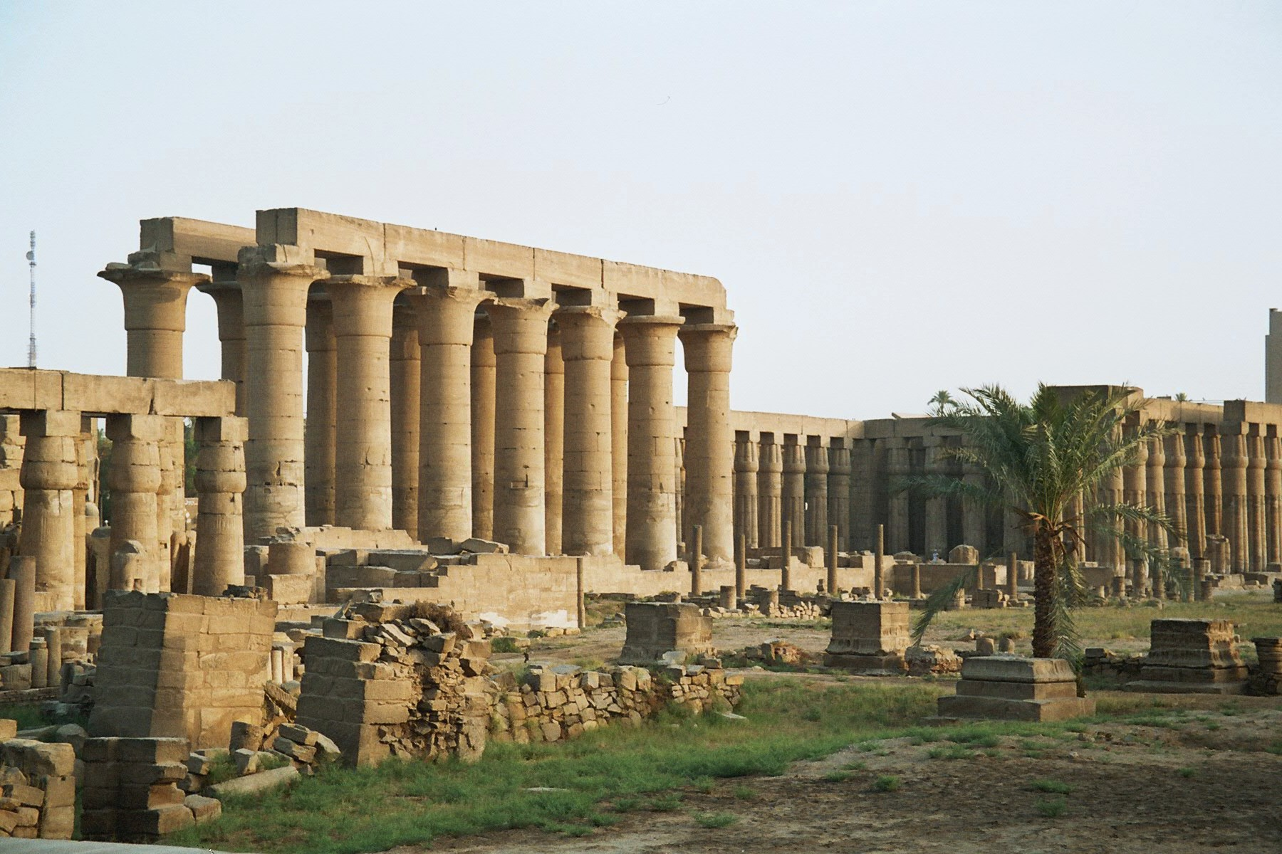 Karnak Temple, Luxor